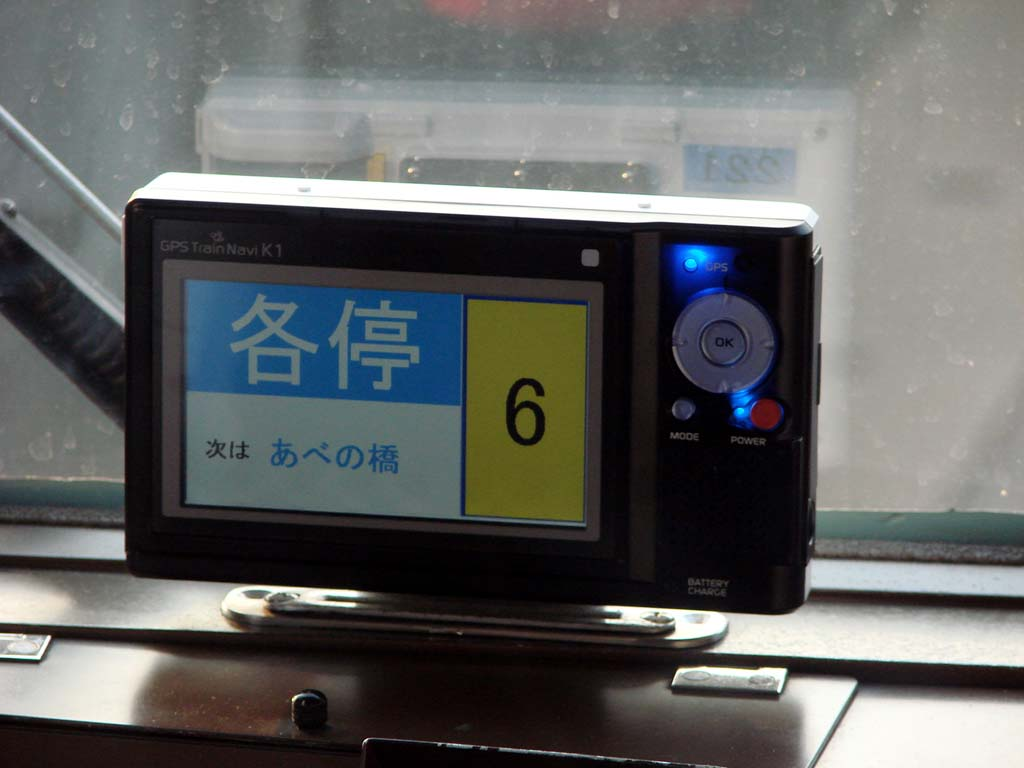 近畿日本鉄道 運転士支援システム（GPSトレインナビ）